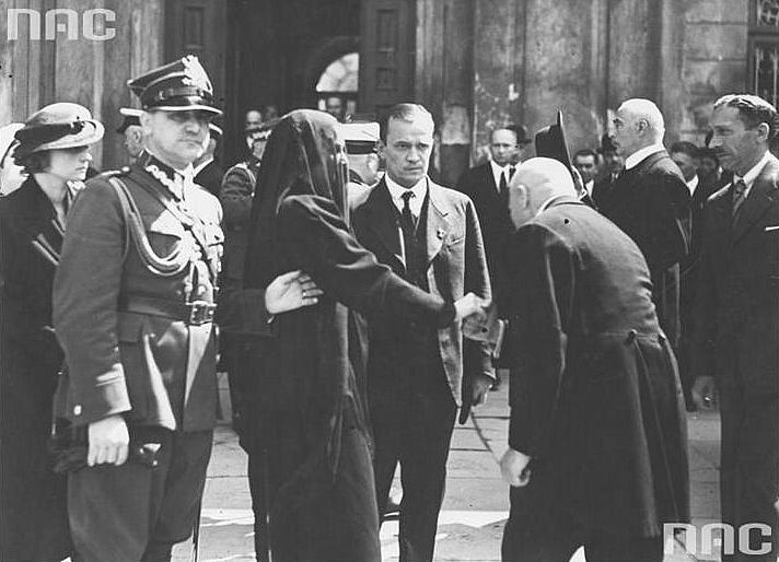 Msza żałobna za gen. Gustawa Orlicza-Dreszera 27 czerwca 1936. Od lewej adiutant generała kpt. Wiktor Langner, żona Elwina Orlicz-Dreszer (trzecia z lewej), brat rtm. Julian Dreszer (czwarty z lewej).